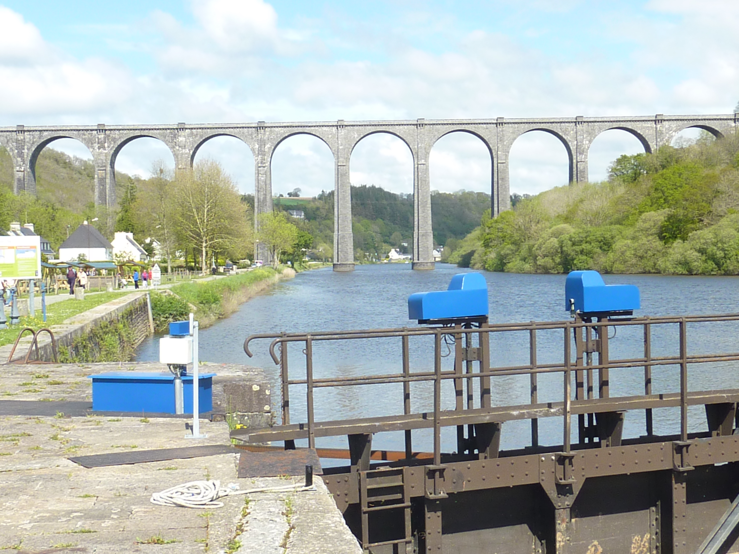 Port-Launay : le viaduc ferroviaire (ligne Quimper-Landerneau) vu depuis l'écluse de Guili Glaz (Aulne, canal de Nantes à Brest)